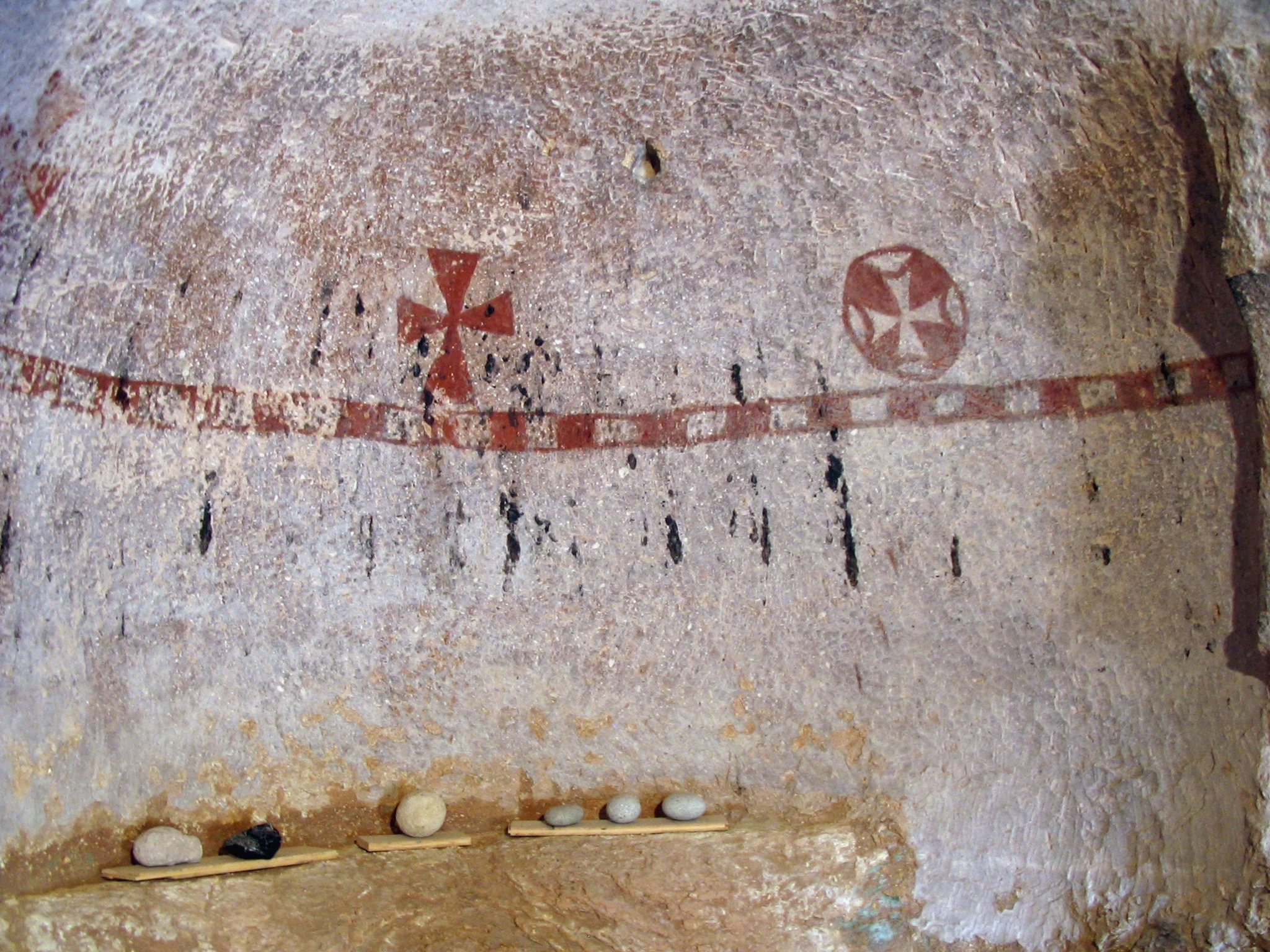 Ikonoklastische Fresken in Johanneskirche, Gülsehir, Kappadokien, Zentraltürkei